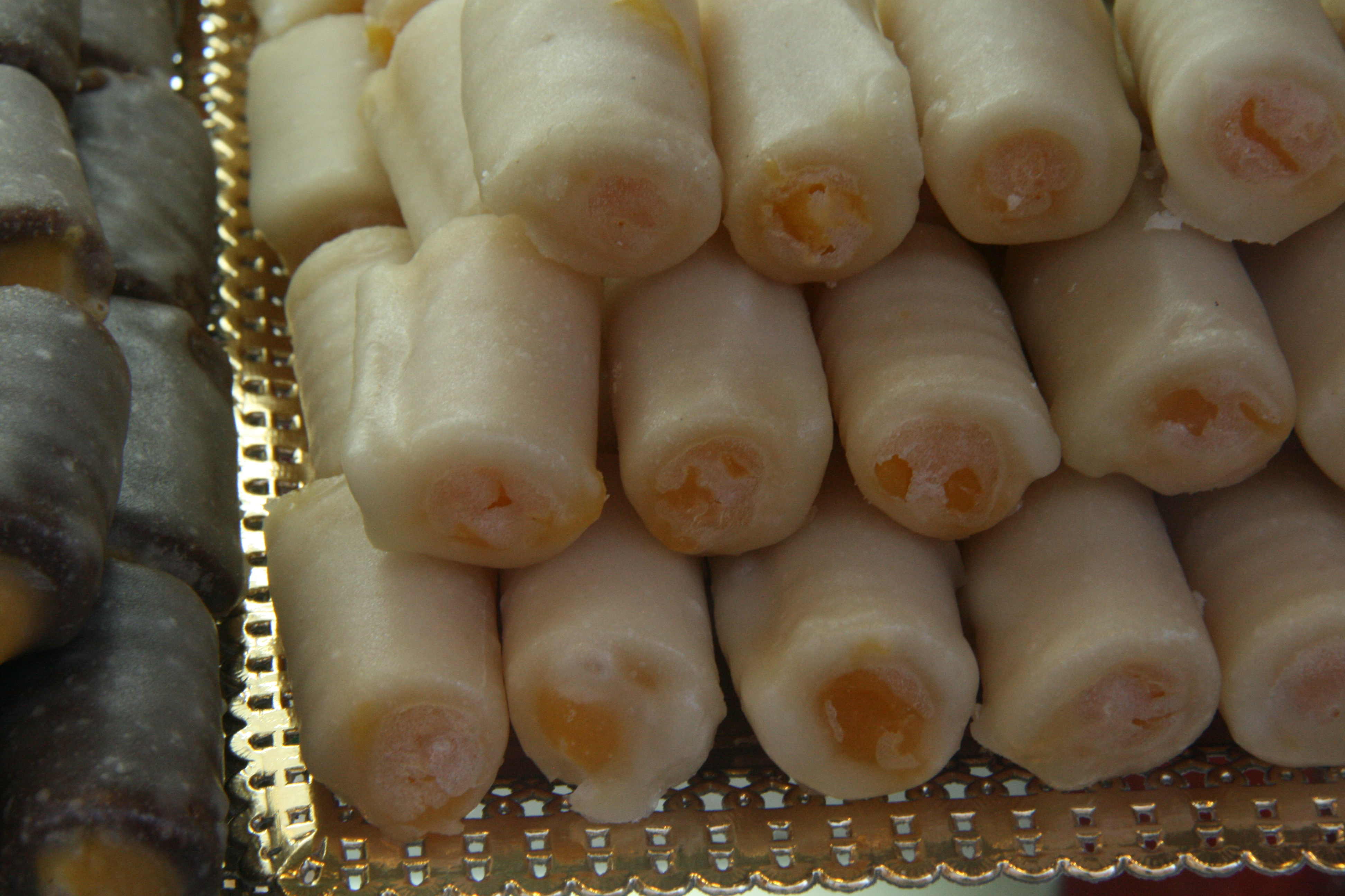 Huesos del santo